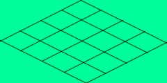 2D引擎的45°地图示意